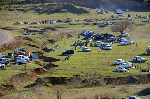 کوردیی ناوەندی: ڕۆژی سەیران و سێزدەبەدر